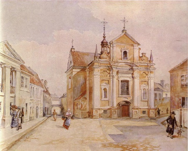 Беларуская (тарашкевіца): Вільня (Vilnia), вуліца Конская (vulica Konskaja). Касьцёл Сьвятога Язэпа пры кляштары кармэлітаў